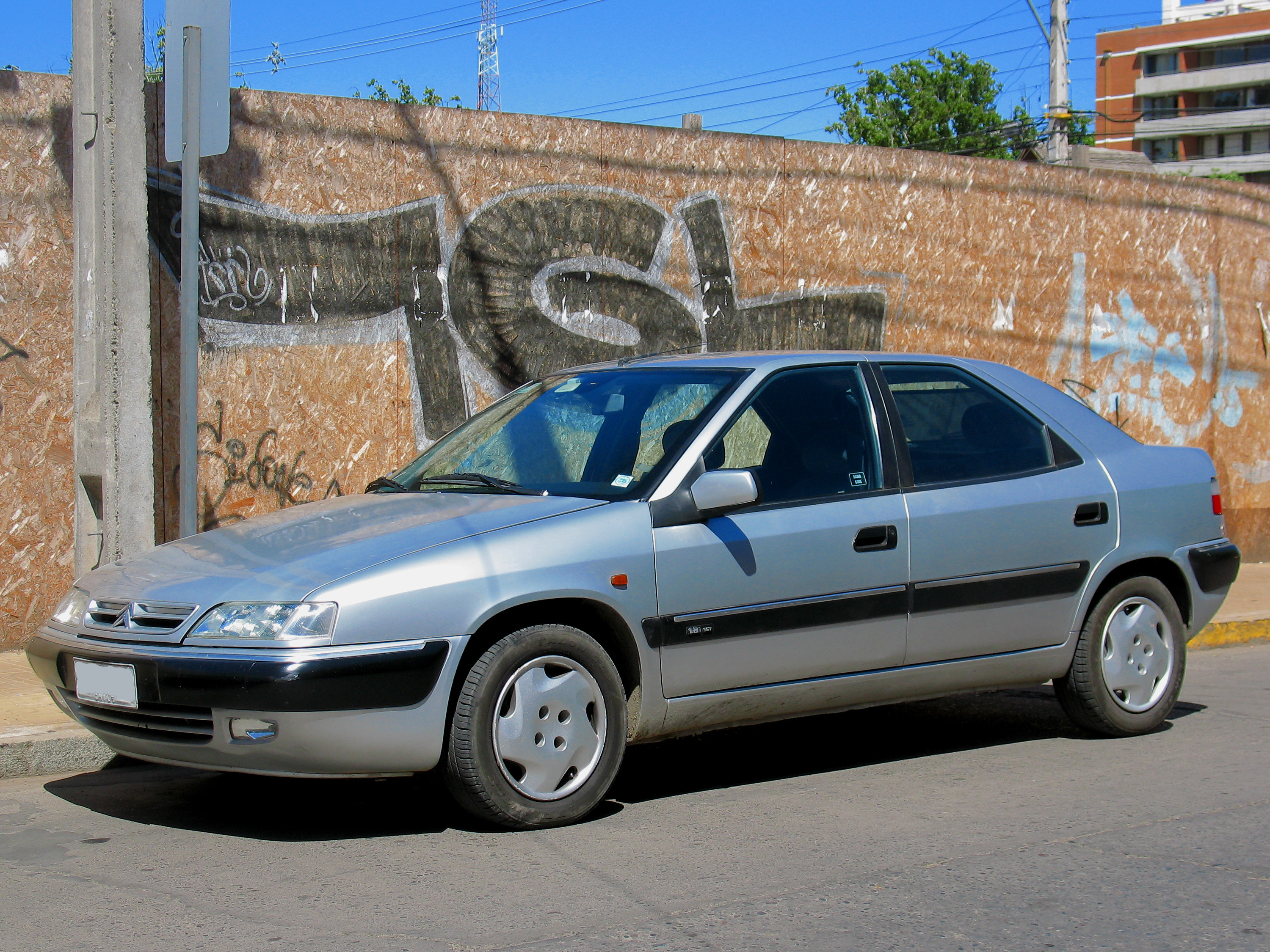 Citroen Xantia 1.8i SX 1999